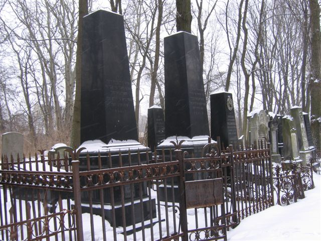 Majer Wolanowski's monument